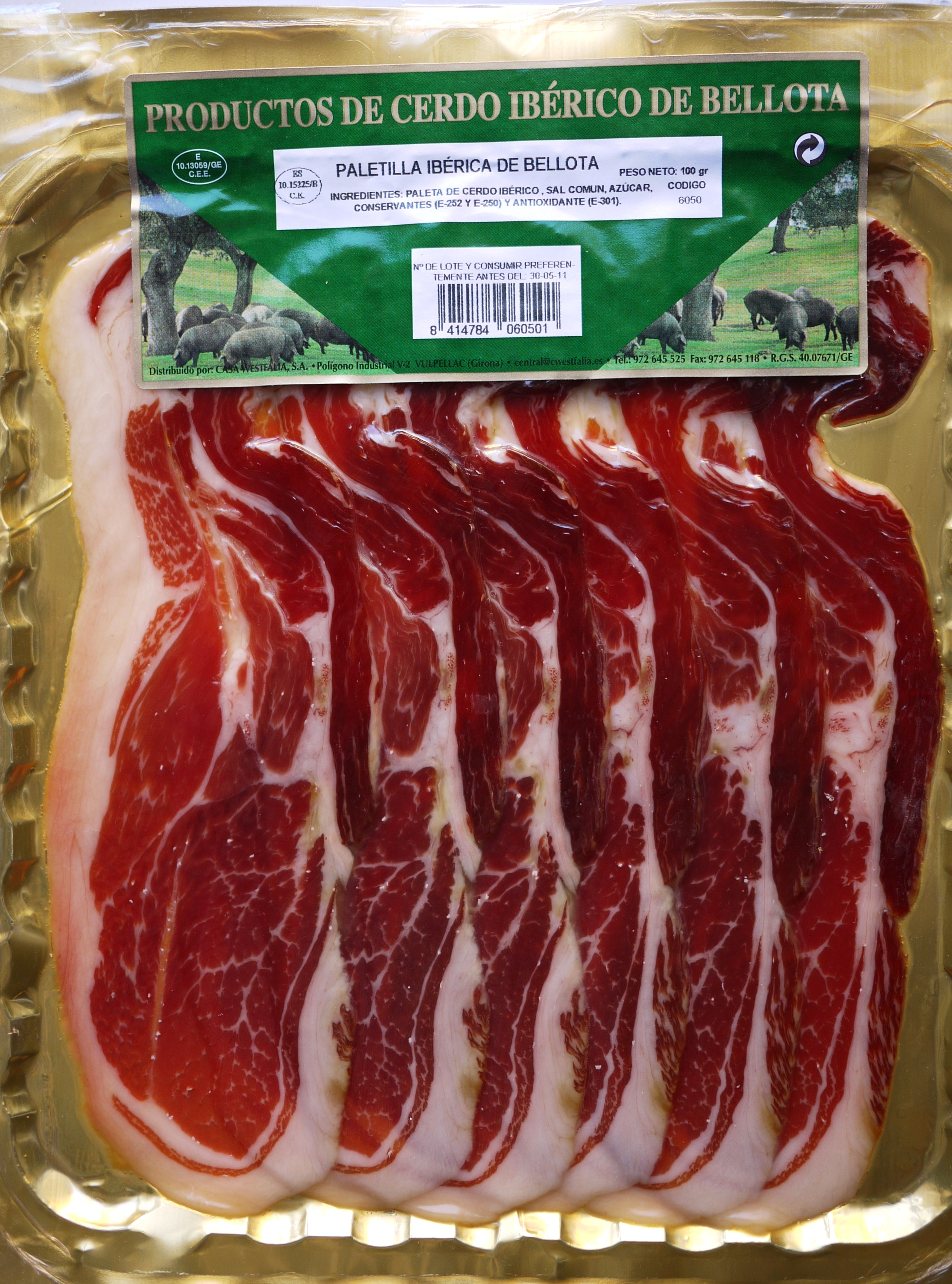 Un sachet de 7 tranches de paletilla de porc ibérique nourri avec des glands (en espagnol "paletilla de cerdo ibérico de bellota"). Cette charcuterie est obtenue avec les pattes antérieures du porc ibérique de bellota (le porc de race ibérique nourri avec des glands). La "paletilla" n' est pas du jambon. Le jambon est obtenu avec les pattes postérieures du porc. Bellota: gland.